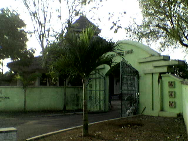 Cemetery in Surakarta